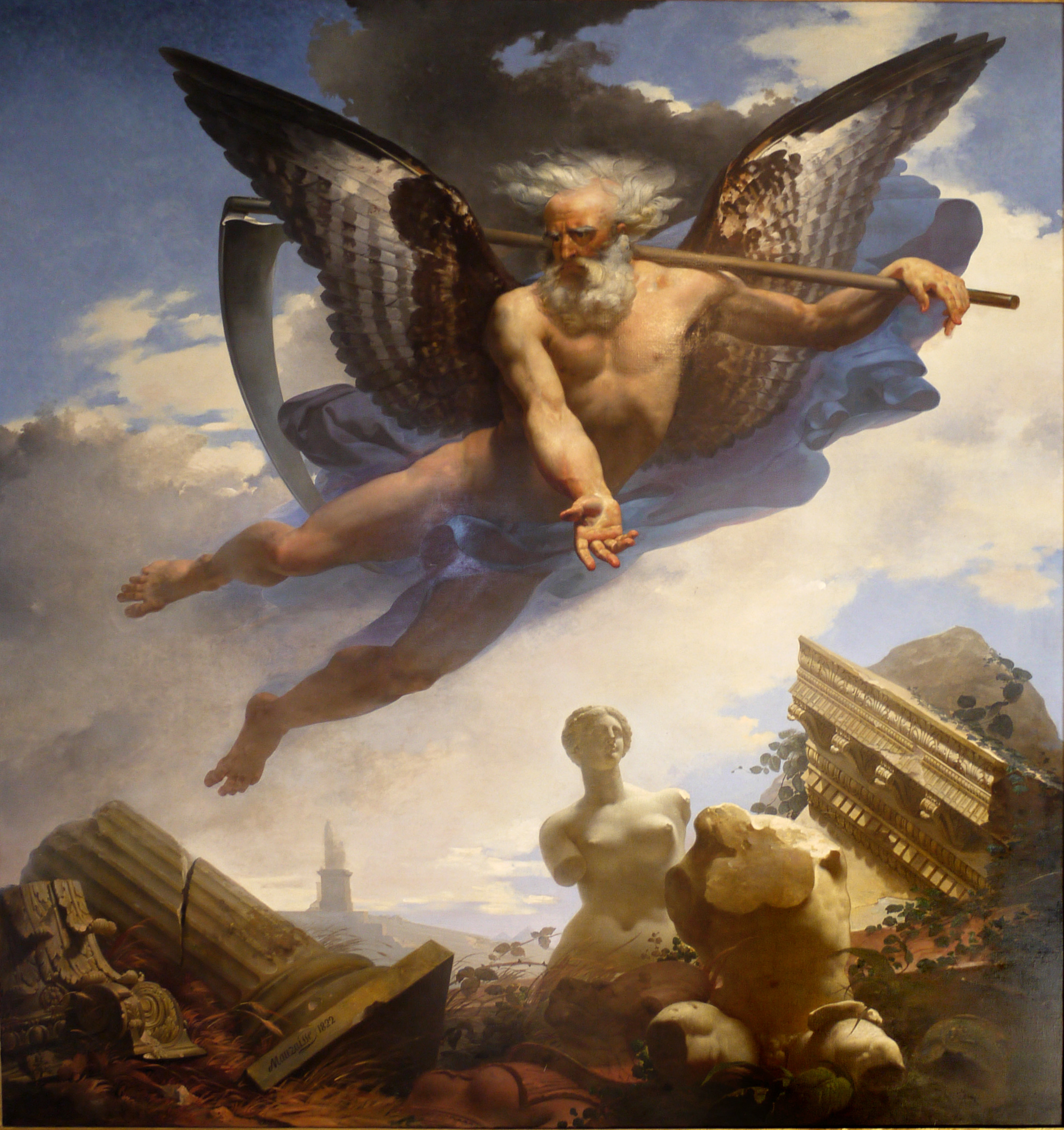 Le Temps montrant les ruines qu'il amène et les chefs d'œuvre qu'il laisse ensuite découvrir, 1822, plafond de la salle des bijoux, Musée du Louvre, Paris.